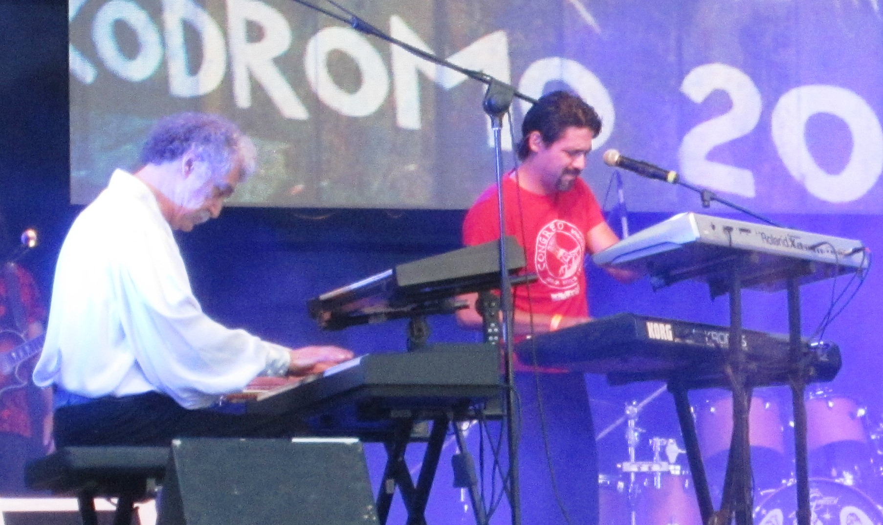 Congreso en el Rockodromo 2017